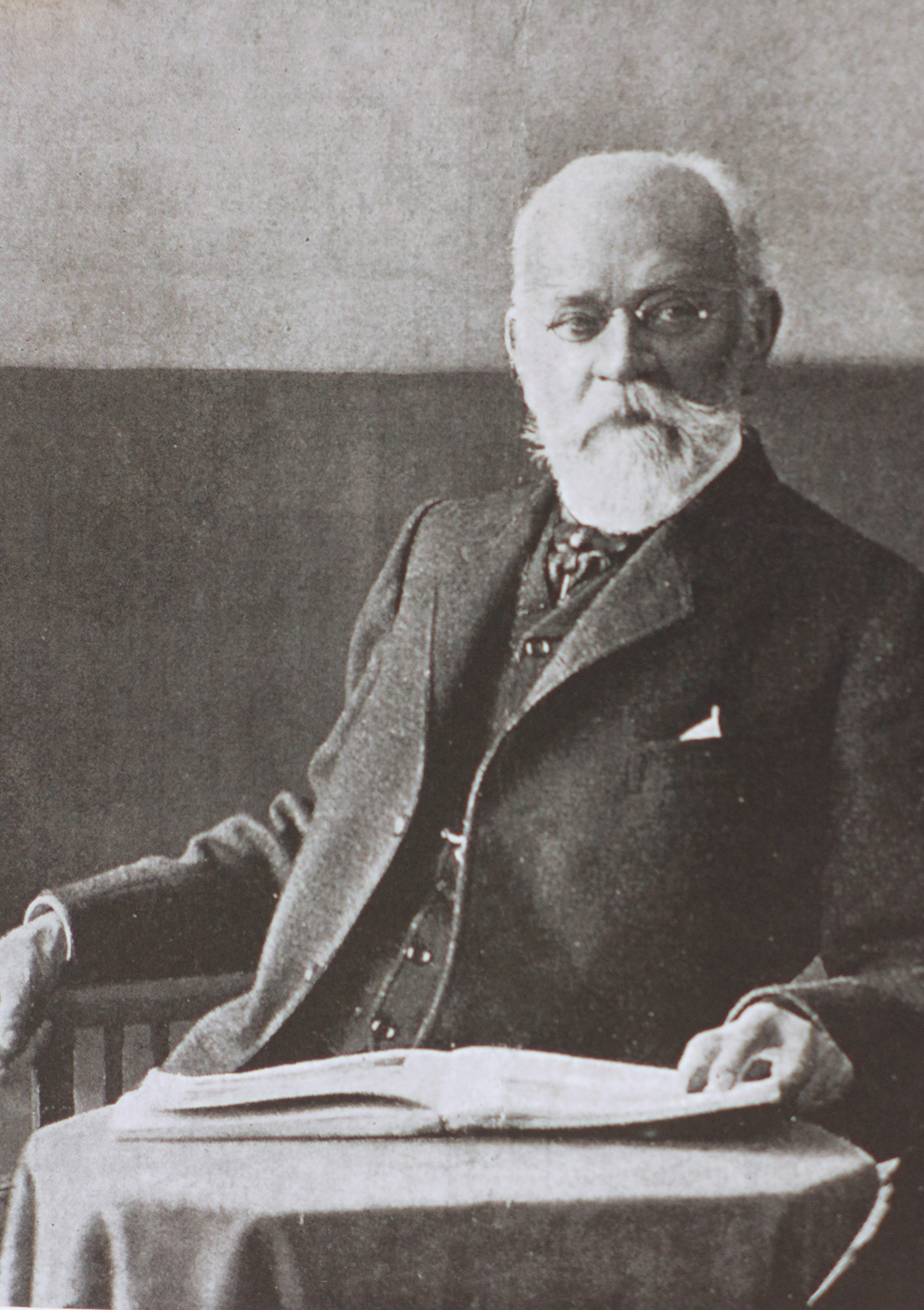 Arnold Güldenpfennig (1830-1908), Archiv des Erzbistums Hamburg